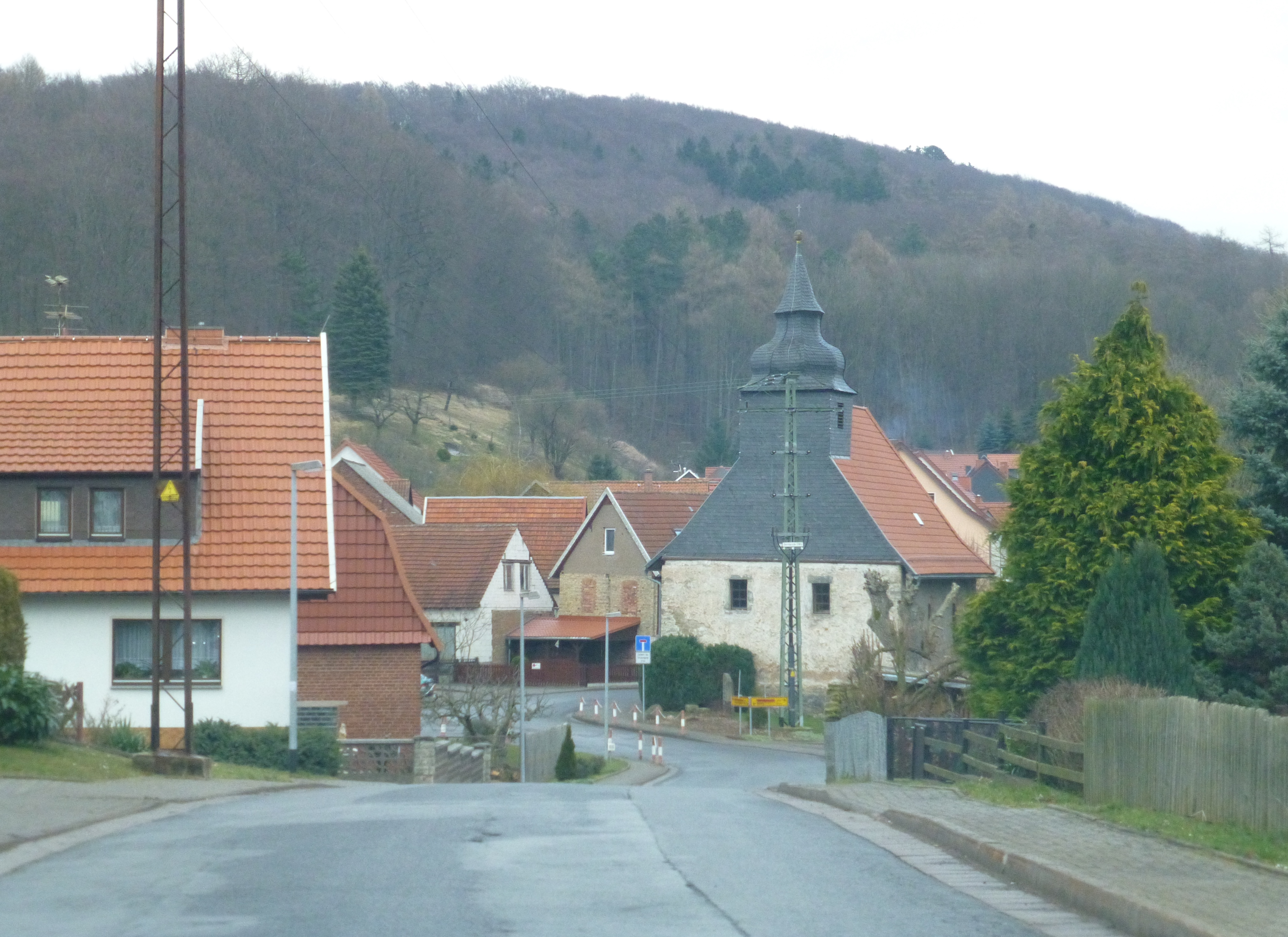 Ansicht von Ascherode (im Hintergrund der Ziegenrück)